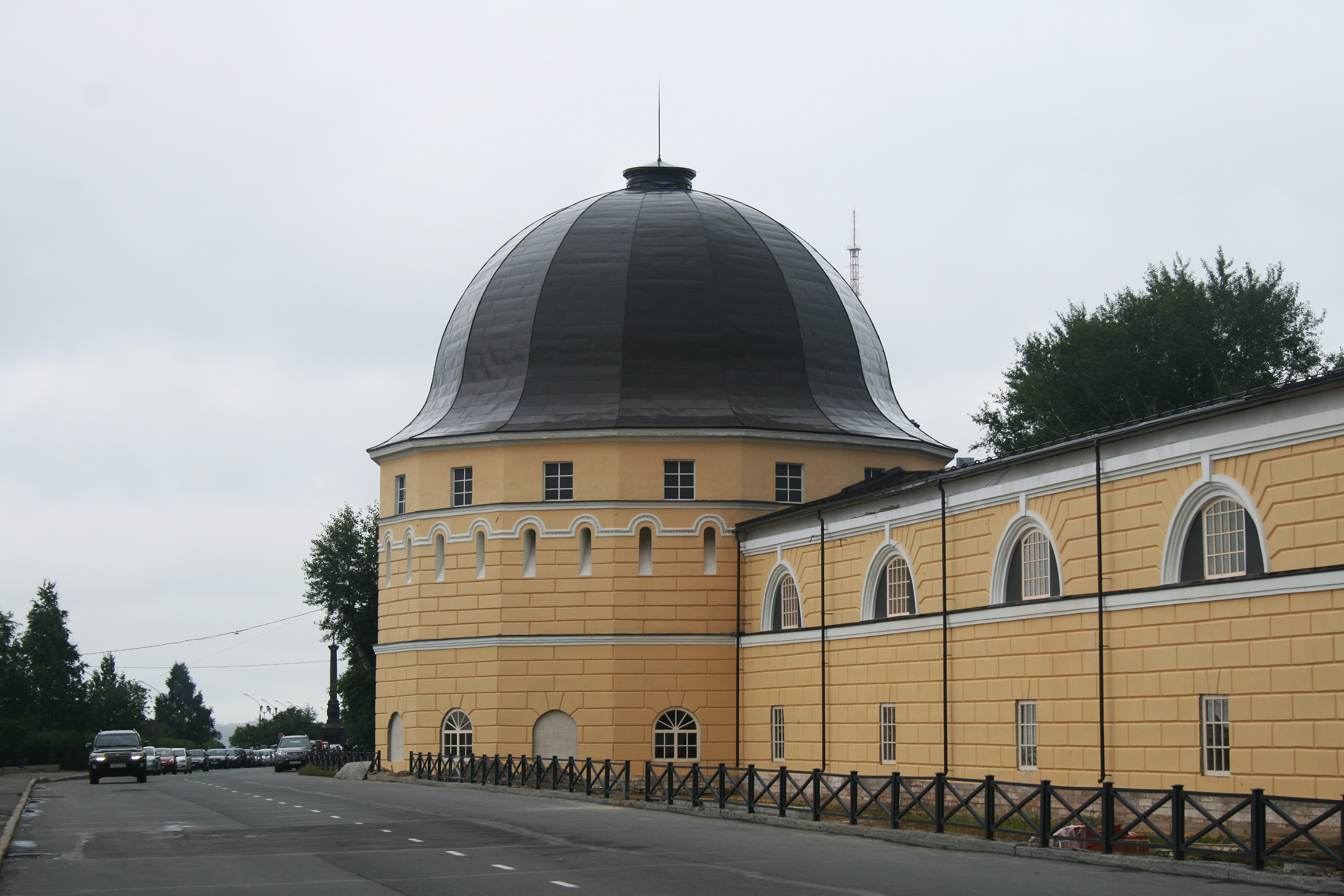 Северная башня Гостиного двора в Архангельске.